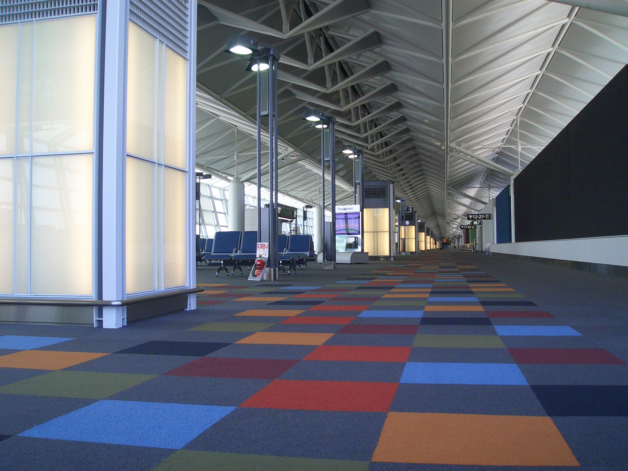 中部国际机场国际航班候机厅23号搭乘口附近